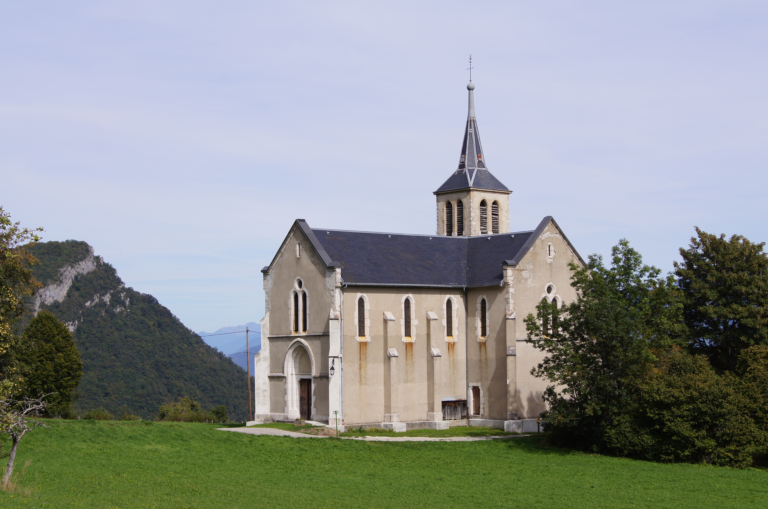 L'église